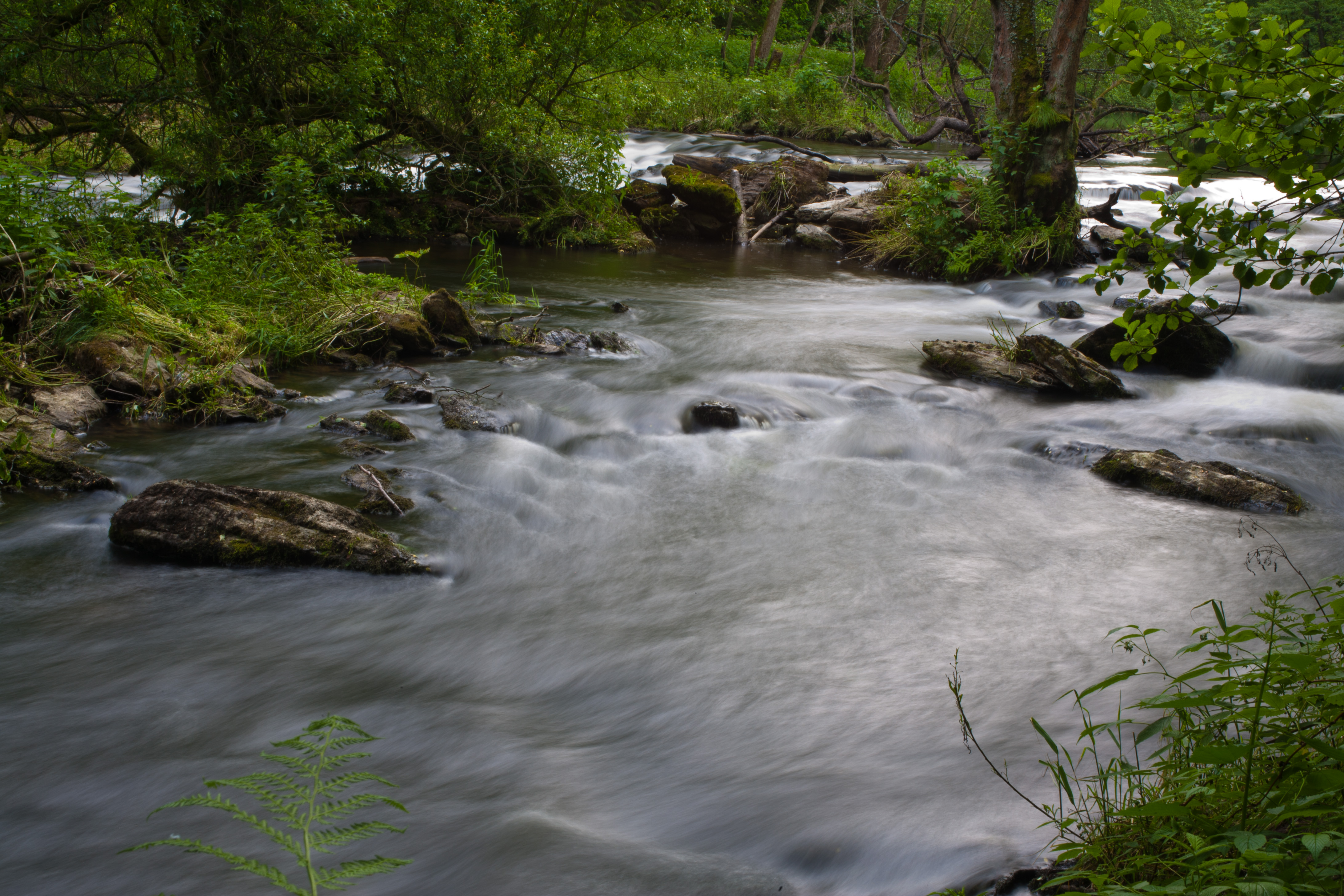 Röslau im Gsteinigt